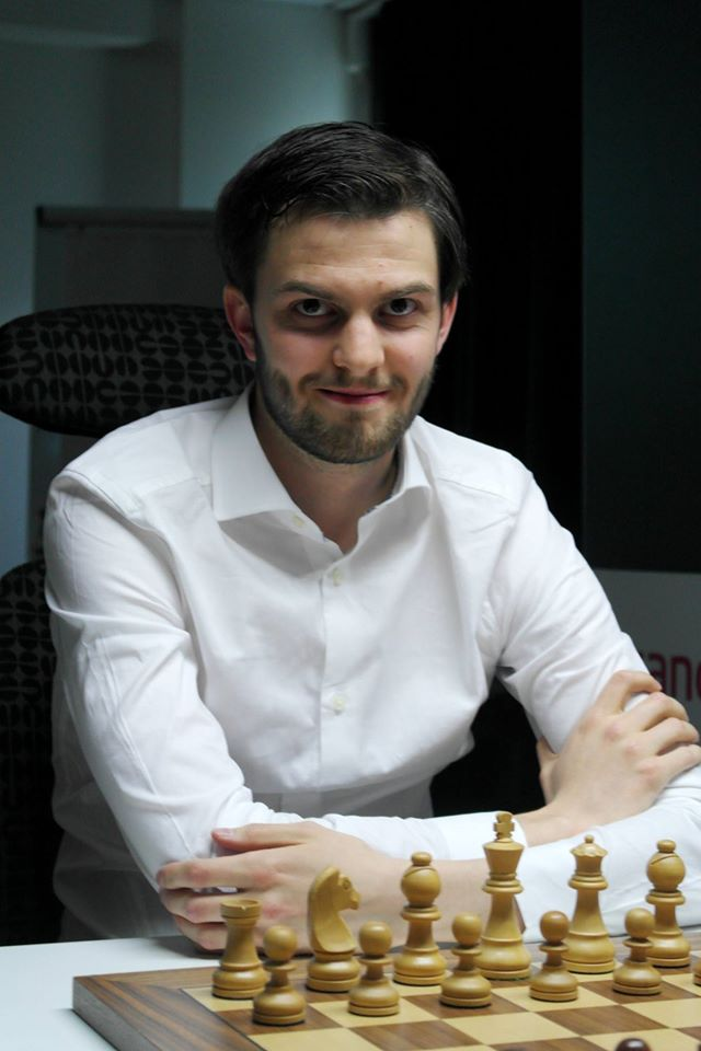 Nils Grandelius spelade i Altibox Norway Chess 2016.